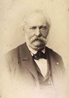 Johan Georg Røebye Grüner (1817-1890), Danish estate owner